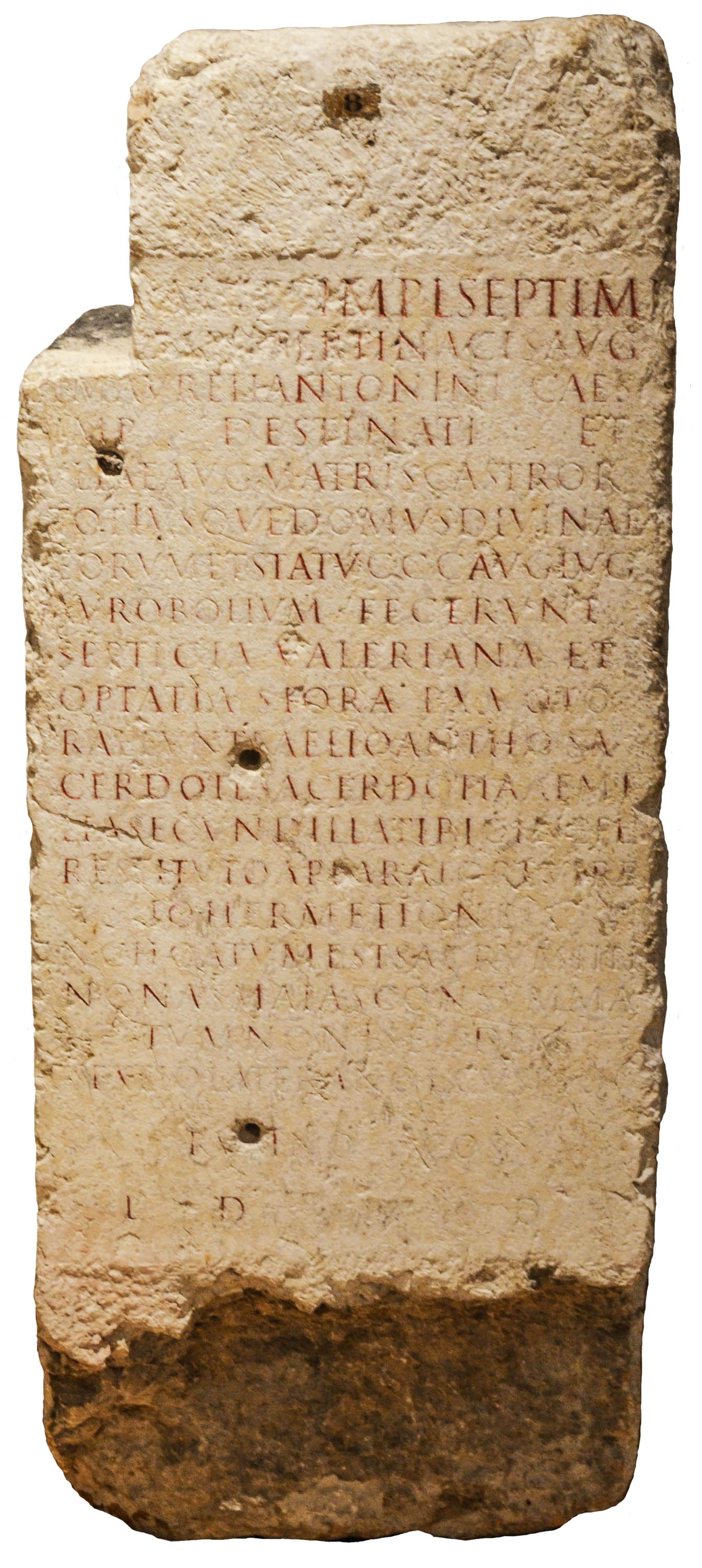 Autel taurobolique, musée gallo-romain de Fourvière, Lyon (CIL XIII 1754)